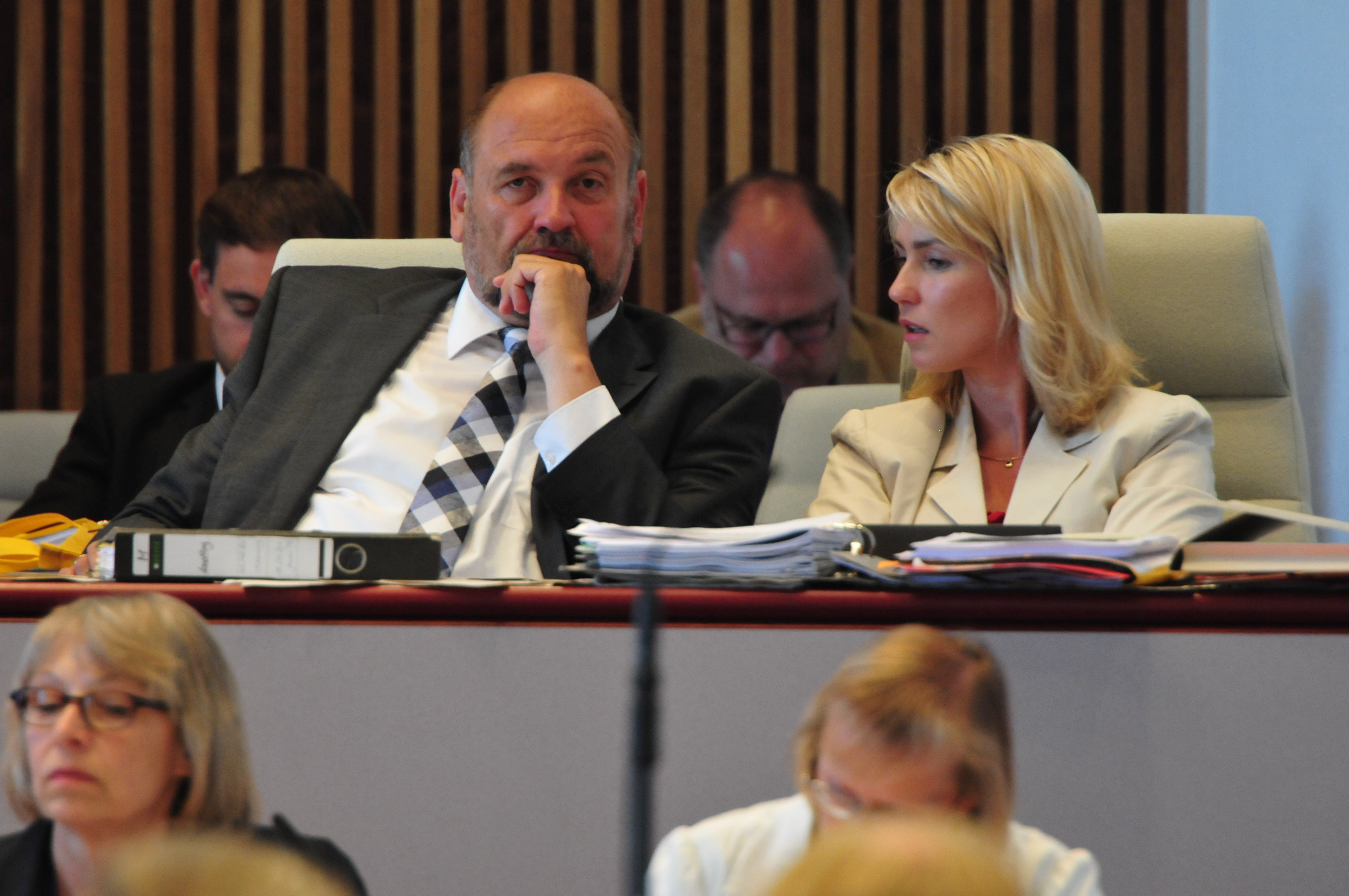 Landtagssitzung des Landtages von Mecklenburg-Vorpommern in Schwerin am 19. Juni 2013.